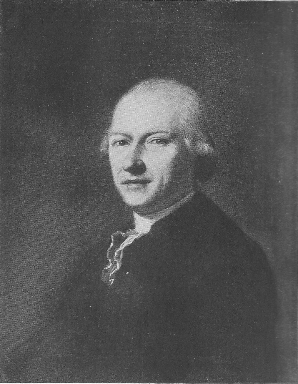 Wilhelm Ferdinand Lipper, Besitz des Herrn Albert Reinking, Haus Düneburg